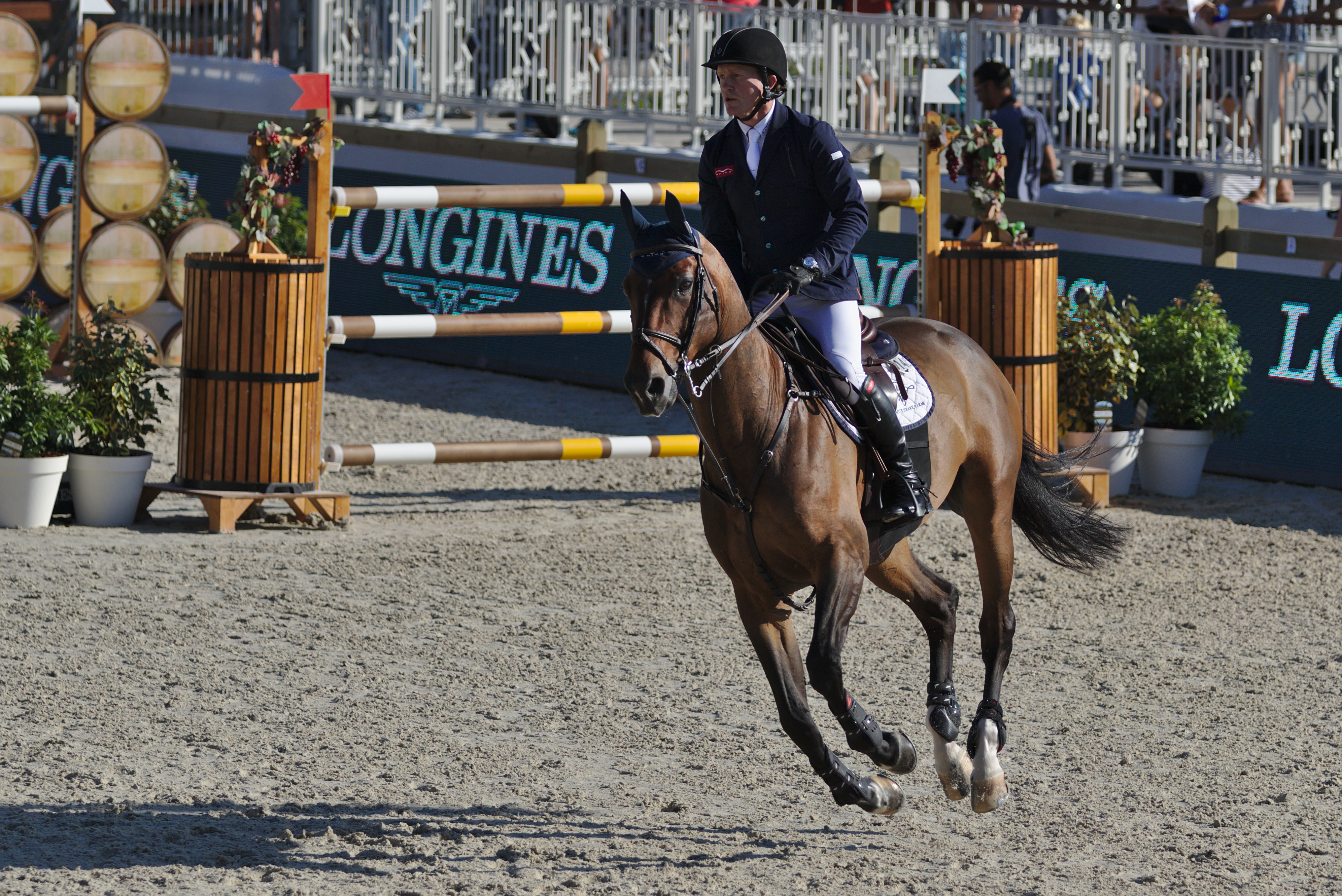 ILHS 2016 - 20160909 - Cameron Hanley et Falco van Spueveld